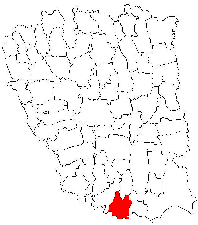 Categorie:Hărţi ale judeţului Galaţi